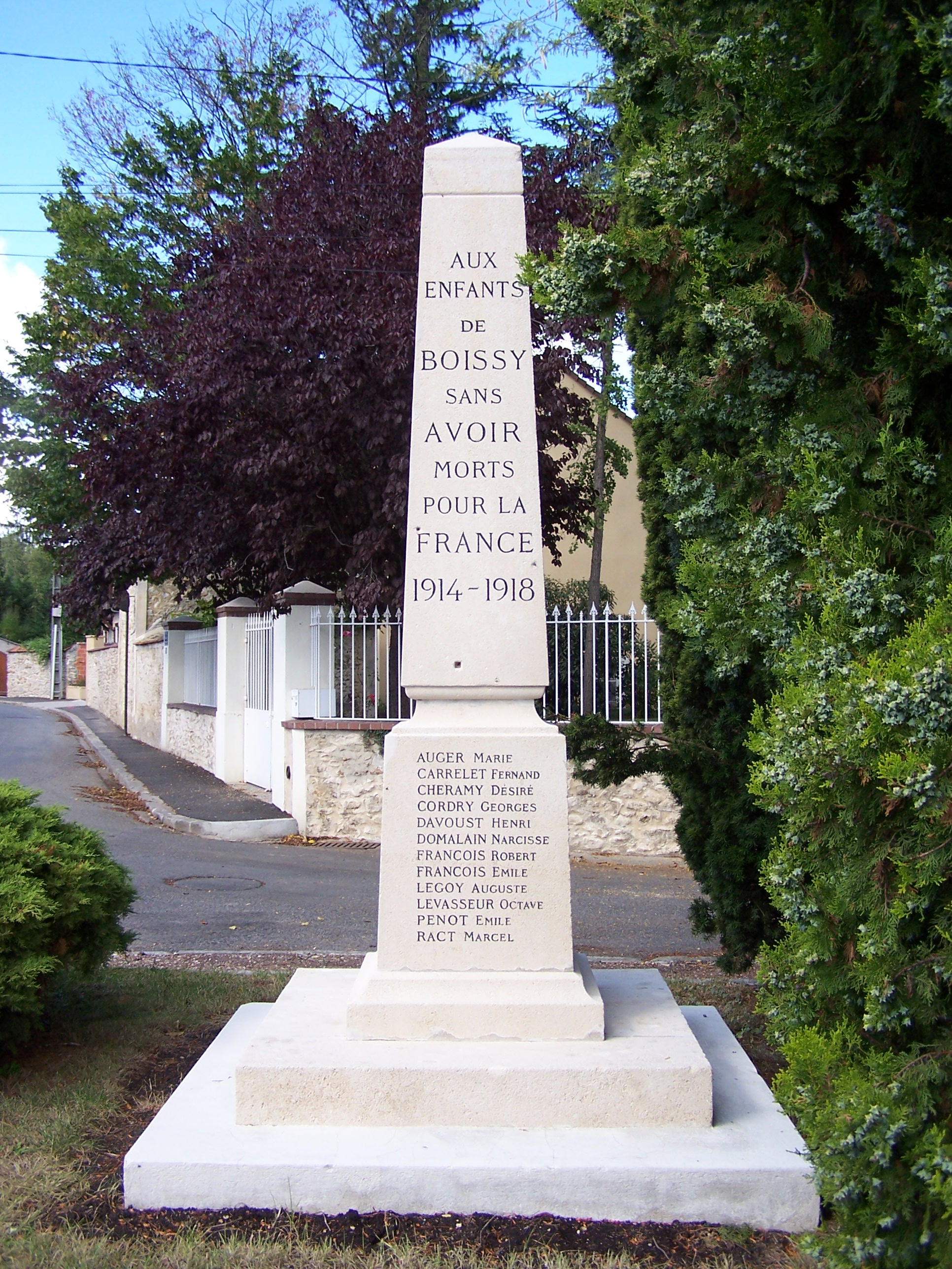 Monument aux morts de Boissy-sans-Avoir (Yvelines, France)